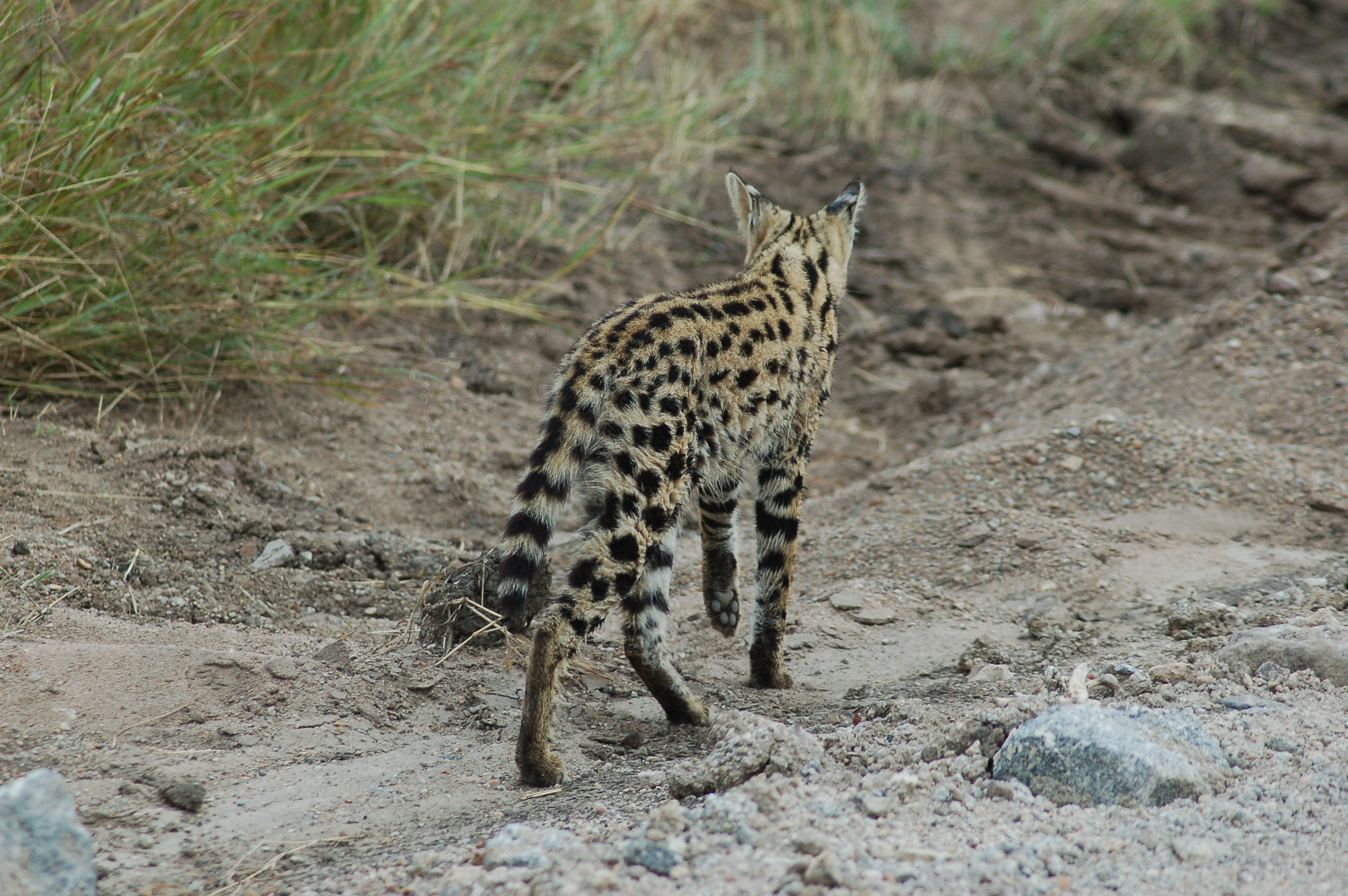 Serengeti, Tanzania